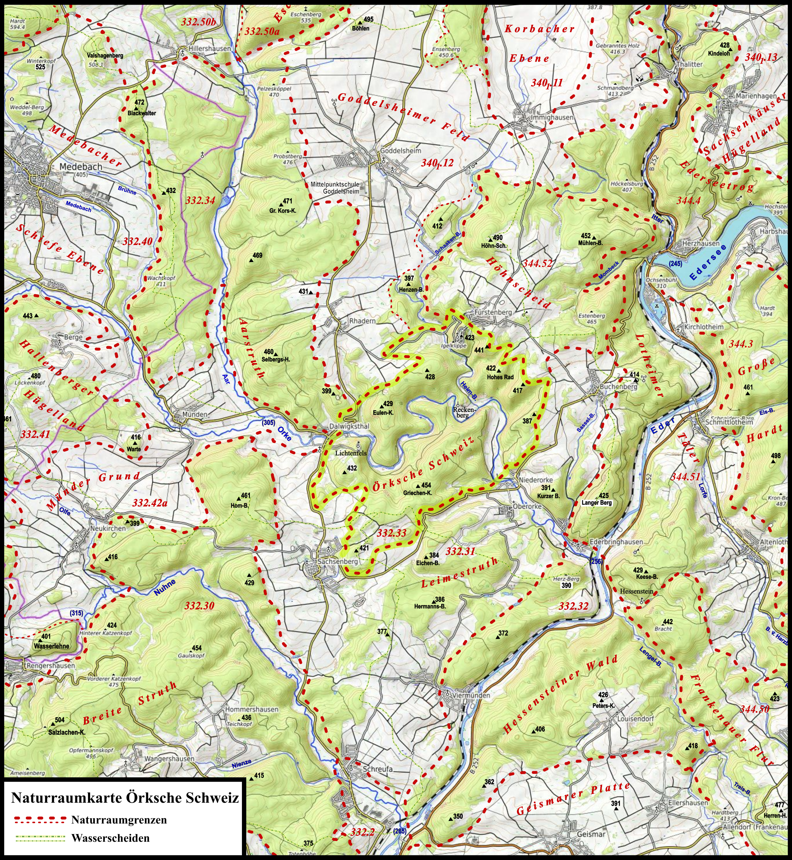 Naturraumkarte der Örkschen Schweiz ("Waldeckische Schweiz") nebst Nachbarnaturräumen